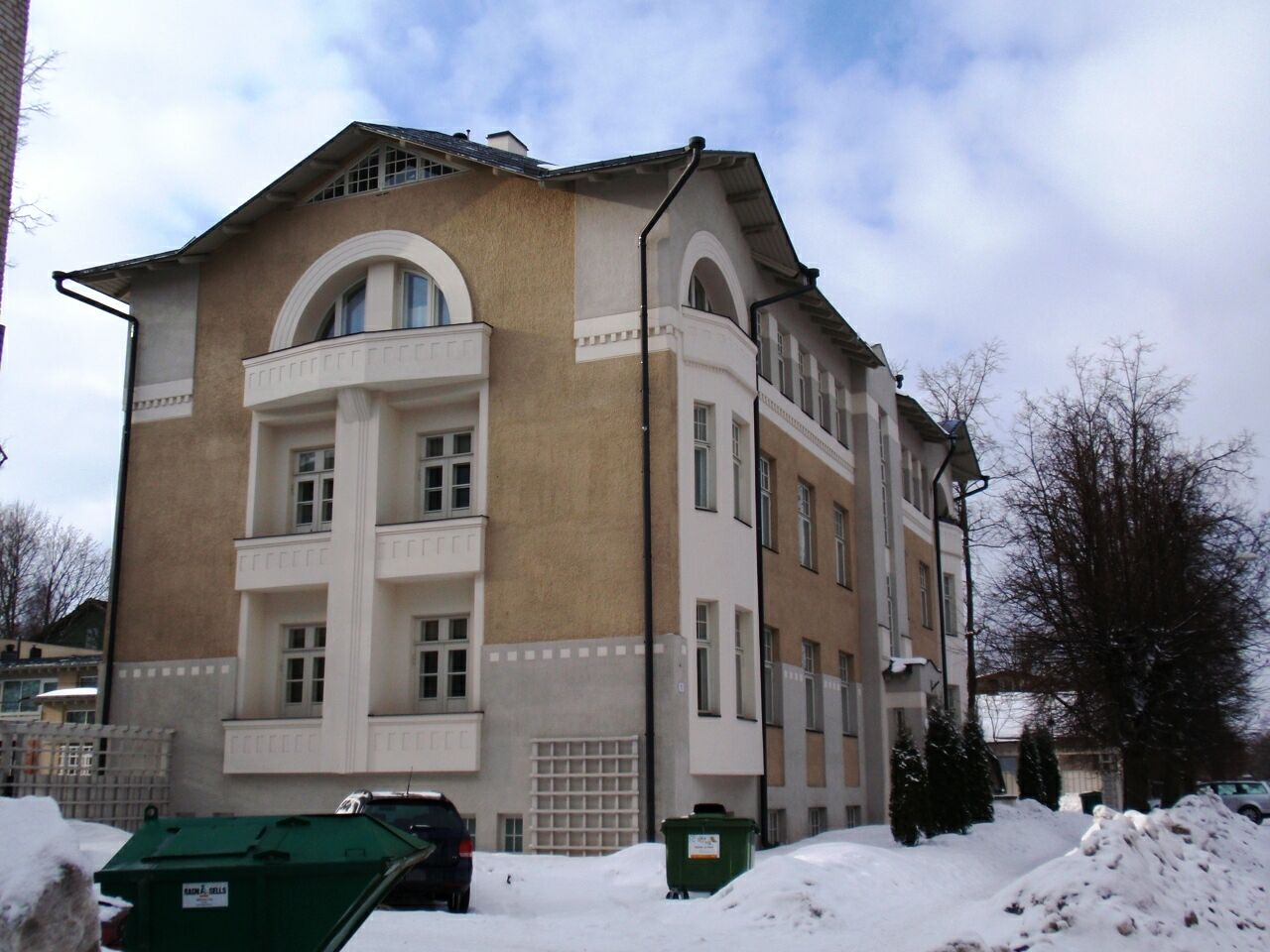 Elamu Tartus A.Haava 1, 1908.a.